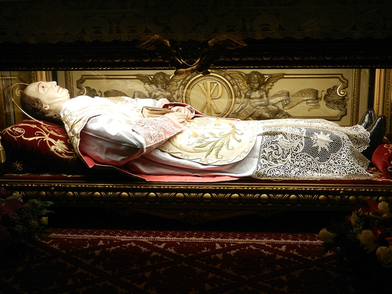 Torino - Tomba di S. Giuseppe Benedetto Cottolengo all'interno della Chiesa dei Ss. Vincenzo de Paoli e Antonio Abate al Cottolengo